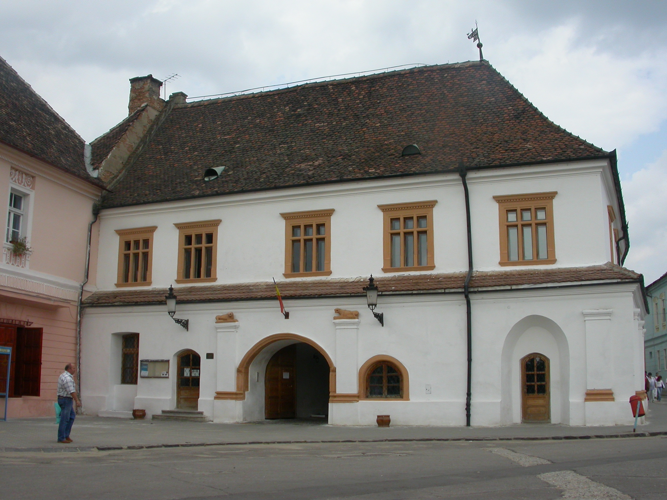 Casa Schuller, azi sediu al FDGR, sec. XVI